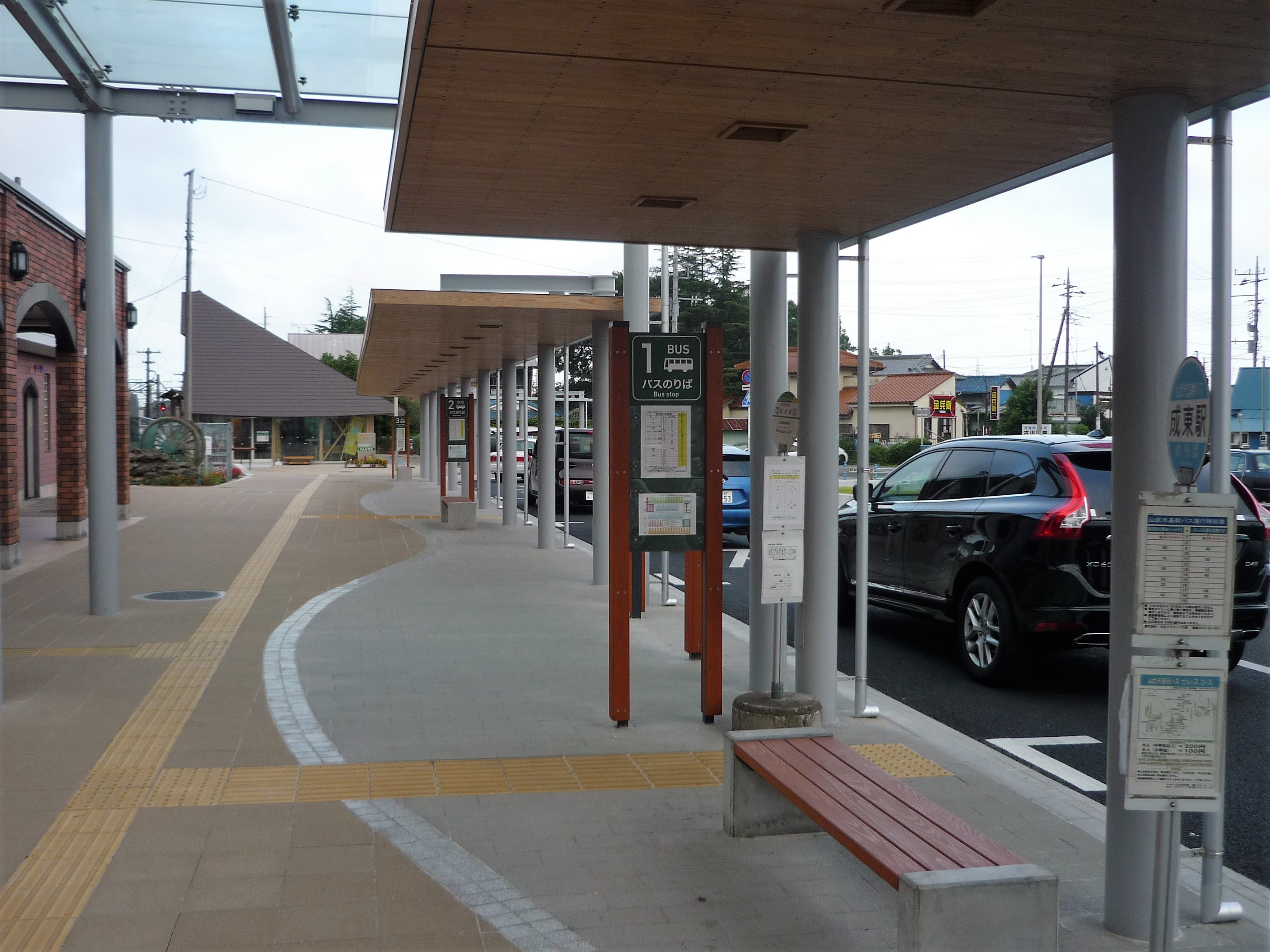 成東駅のバス乗り場 Panasonic Lumix DMC-FS3